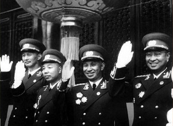 1955年国庆节，陈赓等在天安门城楼上